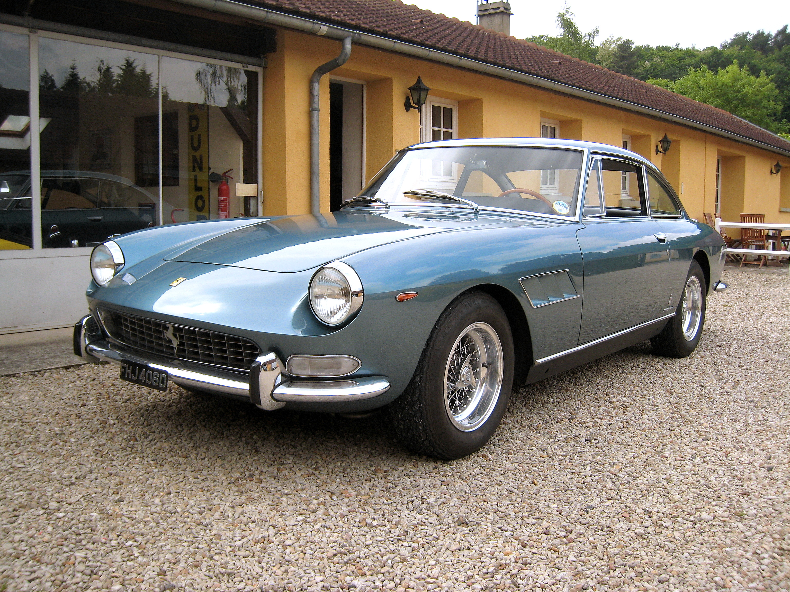 330GT 1966 8175